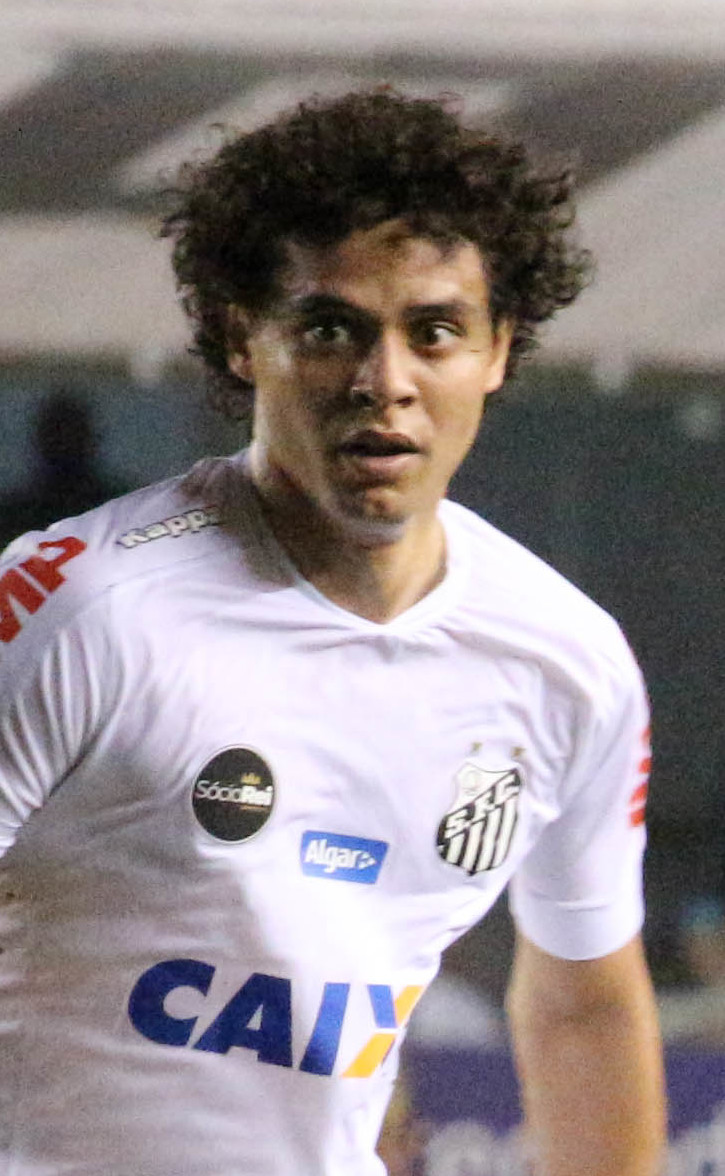 Foto: Douglas Teixeira/Futebol Santista